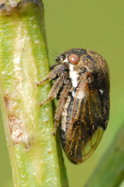 Picture taken in Commanster, Belgian High Ardennes . Species: Gargara genistae